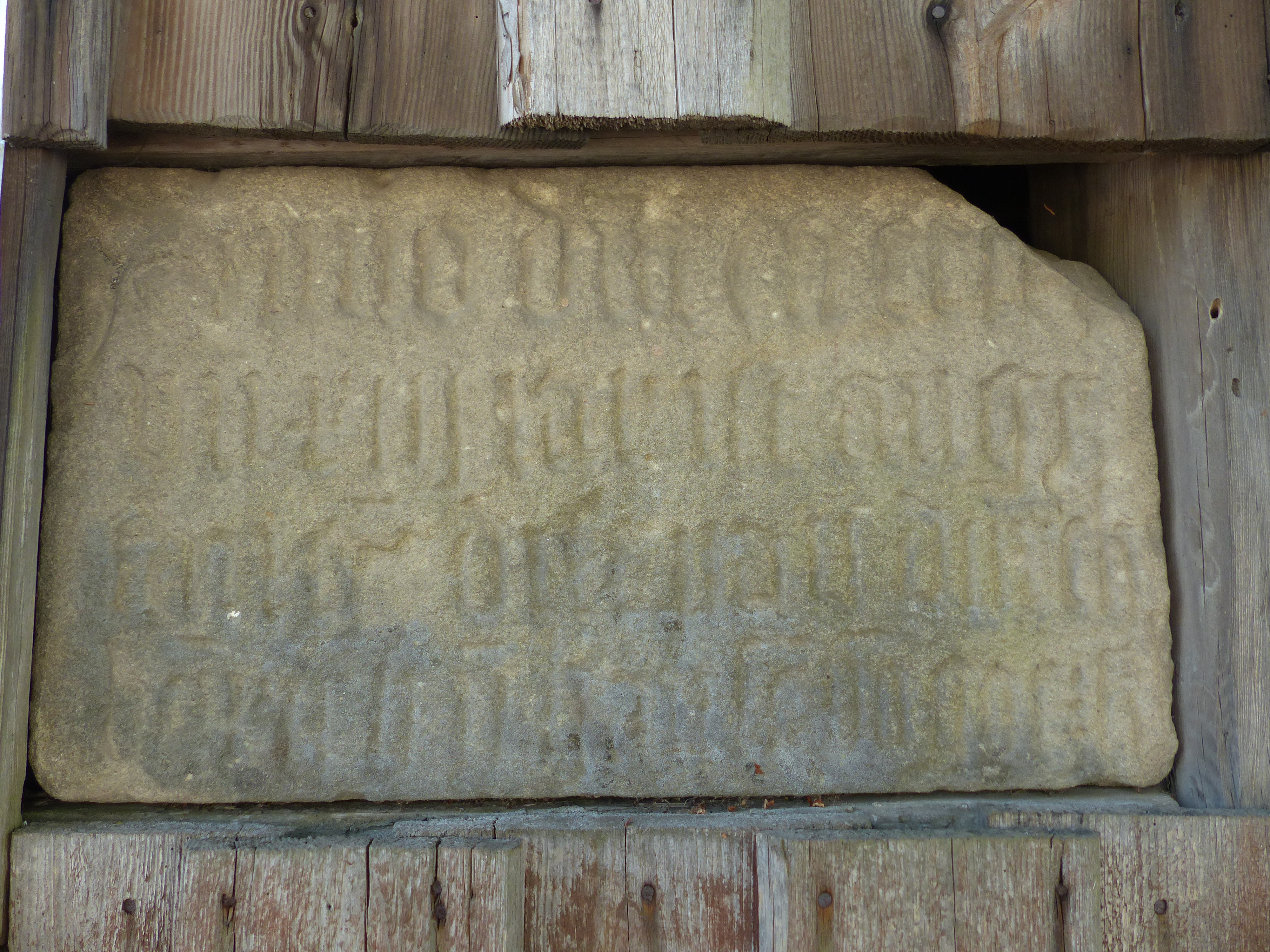 Inschrift in Gottsfeld